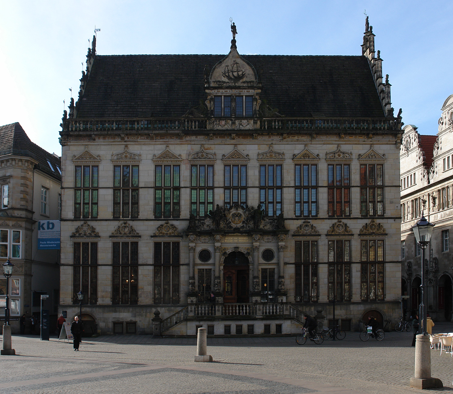 Haus Schütting am Bremer Marktplatz